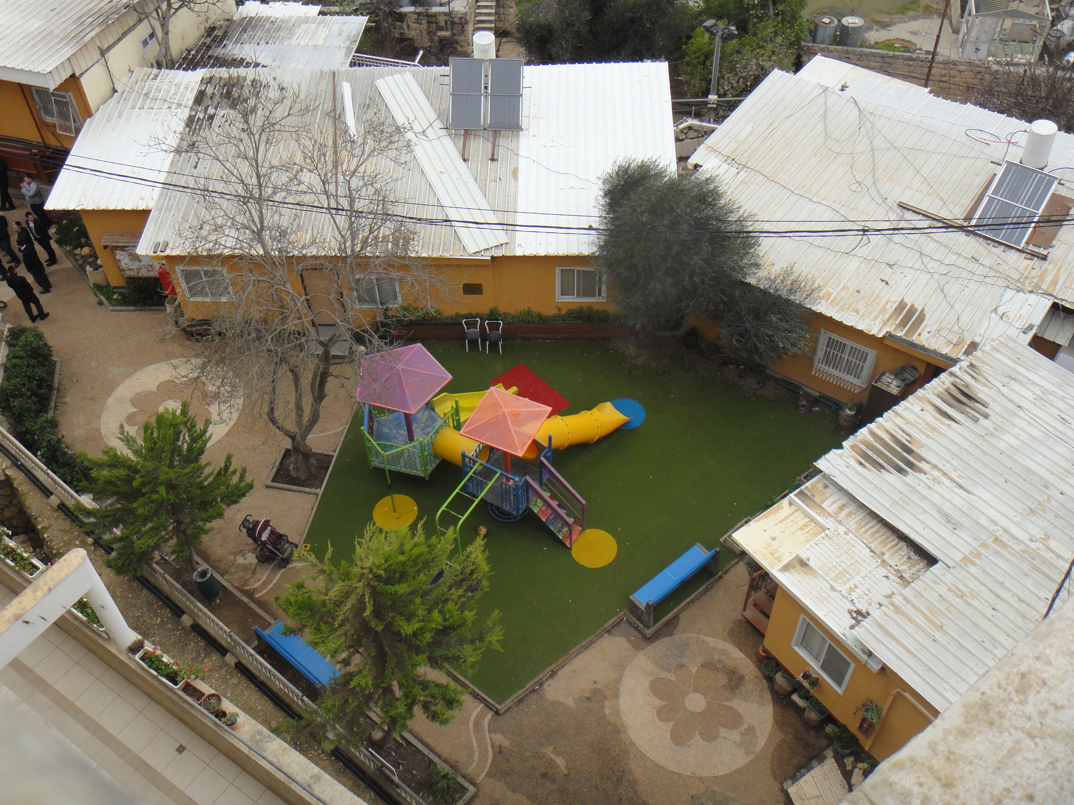 שכונת "אדמות ישי" בחברון